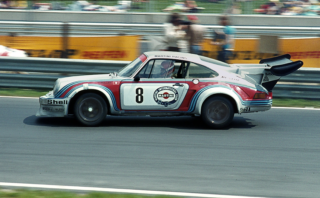 Porsche 911 Carrera RSR Turbo 2.1 mit Gijs van Lennep beim 1000-km-Rennen auf dem Nürburgring (eingangs Nordkurve).